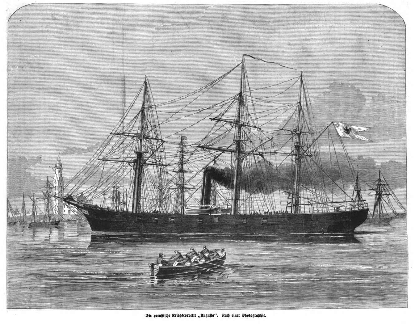 Die preußische Kriegskorvette "Augusta", 1864.